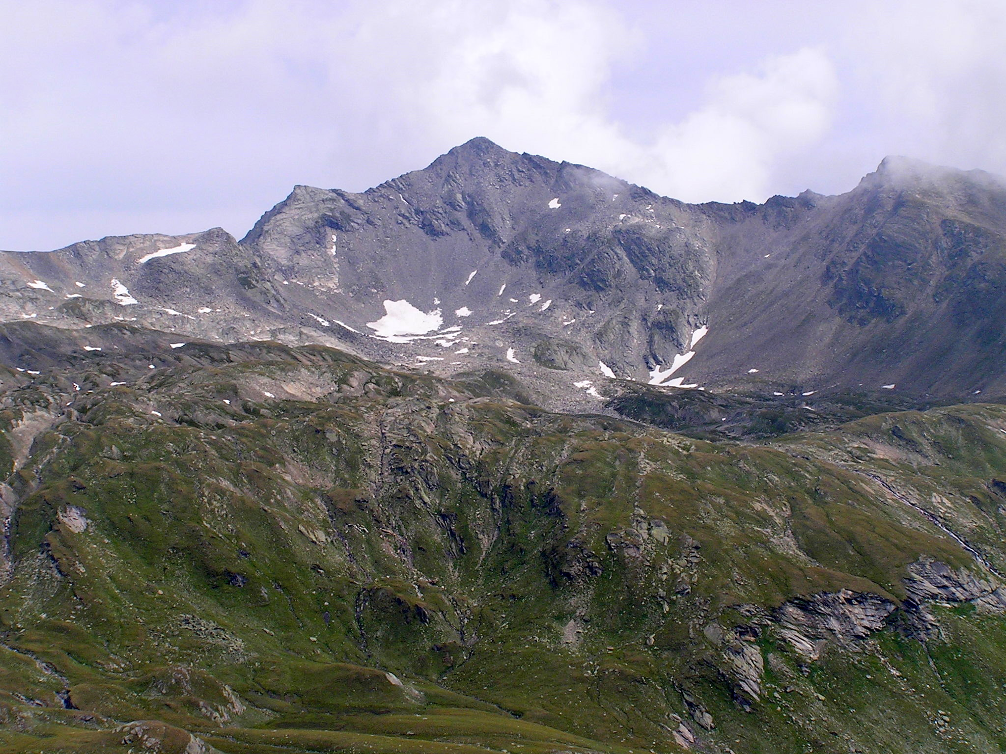 Der Wildenkogel von Südwesten, von der Badener Hütte aus gesehen